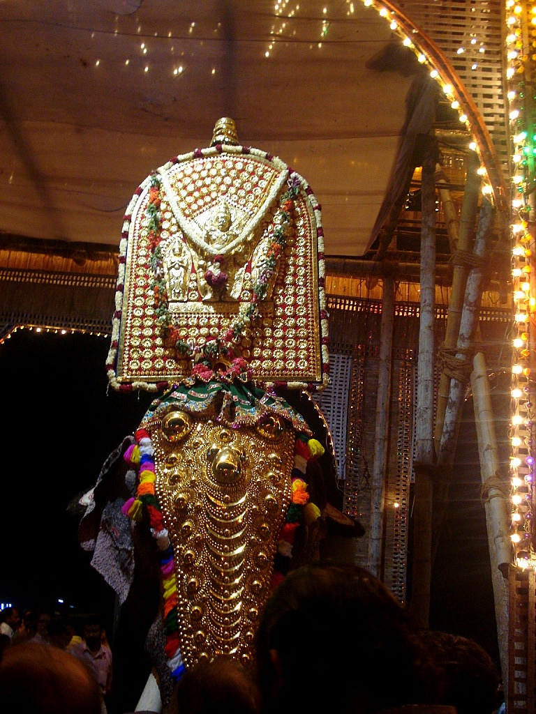 Thriprayar thevar..on pooram day..